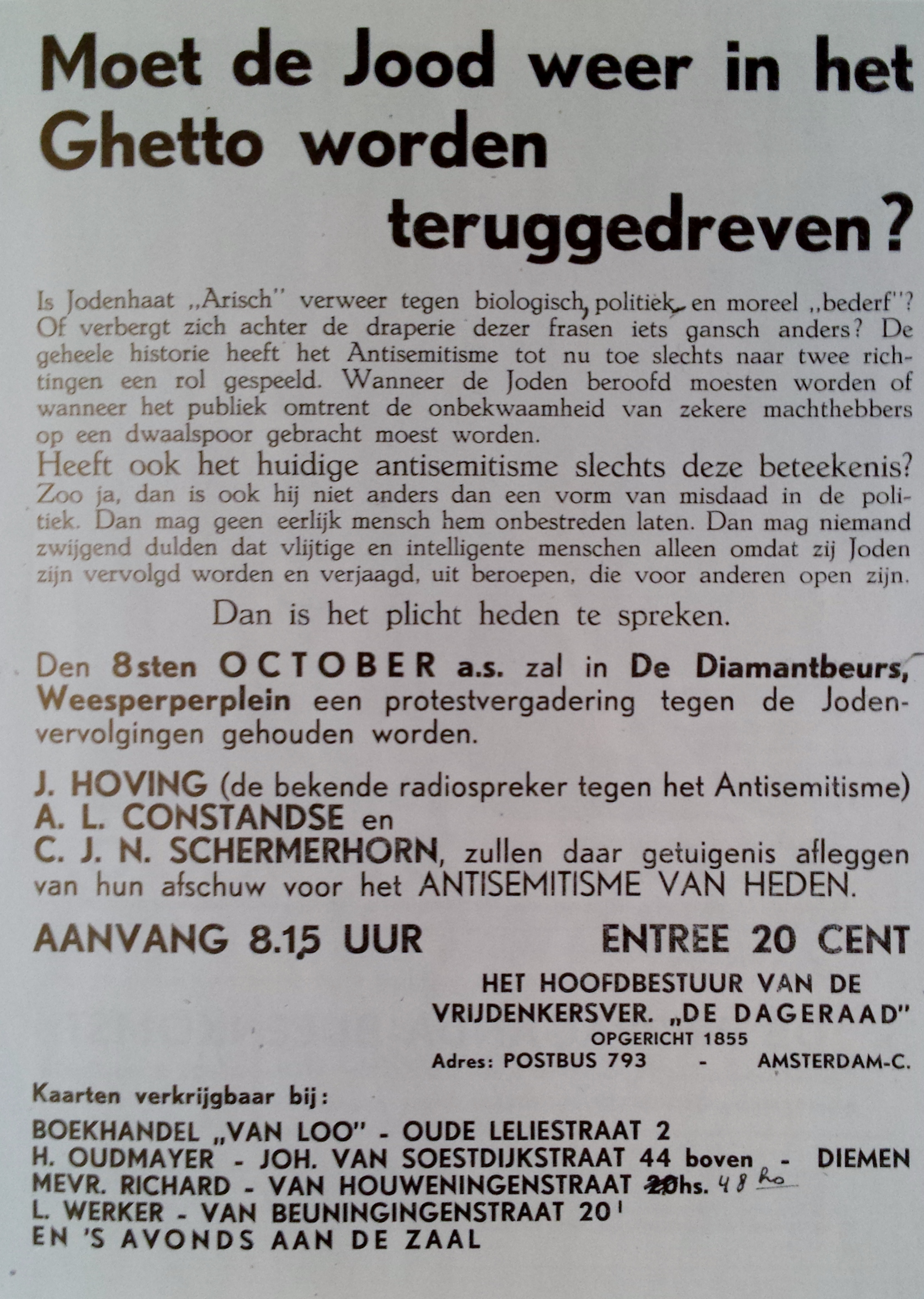 Oproep tot het bijwonen van een protestbijeenkomst van de Nederlandse vrijdenkersvereniging De Dageraad tegen antisemitisme en jodenvervolging in 1935.